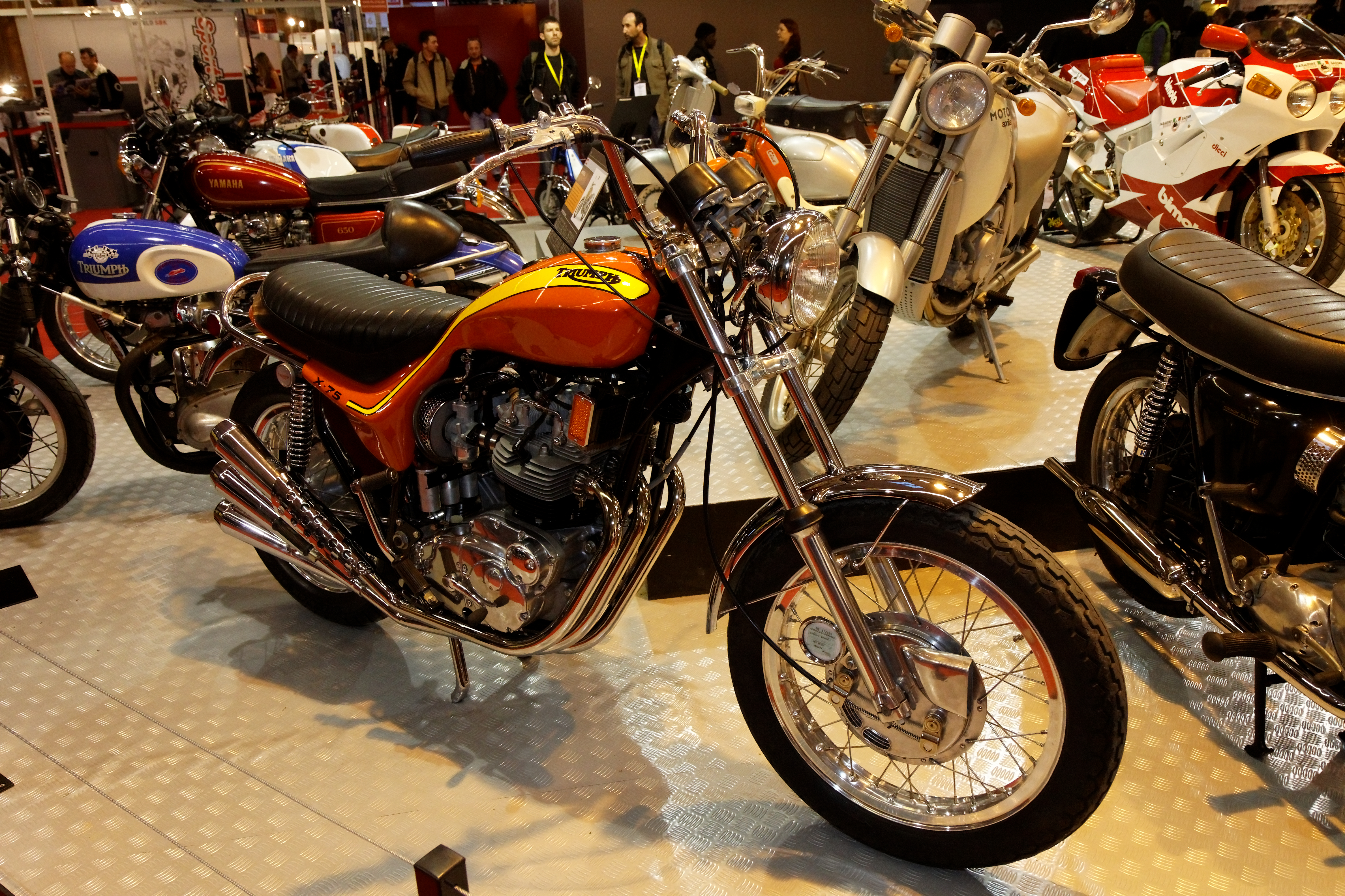 Triumph - X75 Hurricane